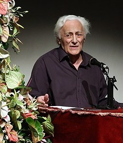 منوچهر انور در مراسم بزرگداشت محمد زهرایی مدیر نشر کارنامه، فرهنگسرای نیاوران